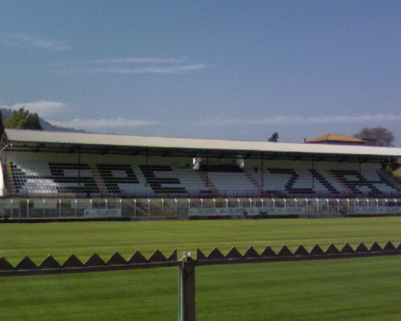 Tribuna dello stadio "Alberto Picco", La Spezia, Italia.